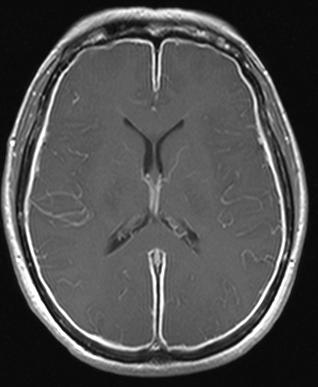 Bakterielle Meningitis; T1w-Kernspinaufnahme mit Kontrastmittel